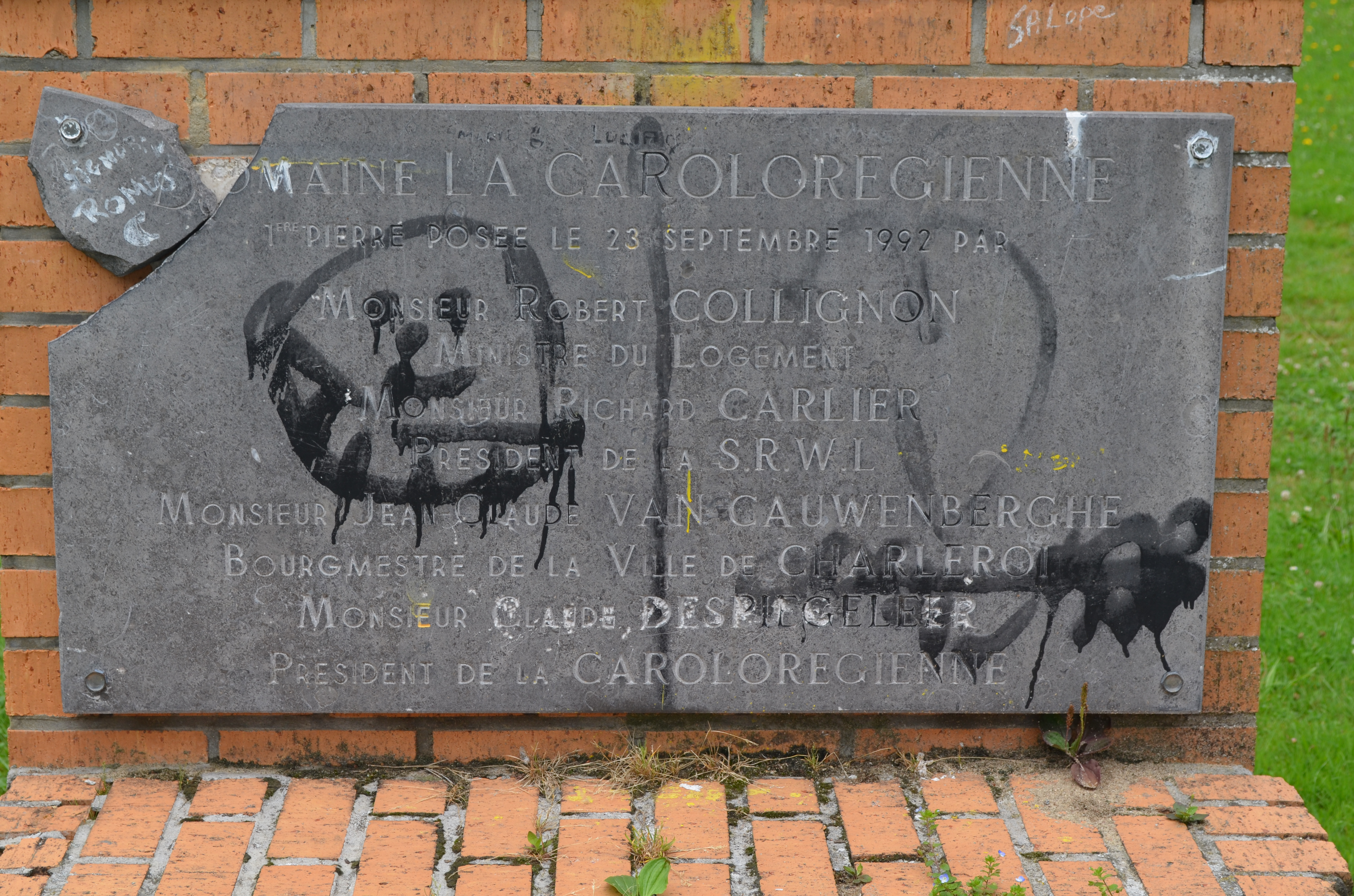 Marcinelle (Charleroi-Belgique) - Domaine la Carolorégienne (Cité de l'Enfance) - plaque de 1992